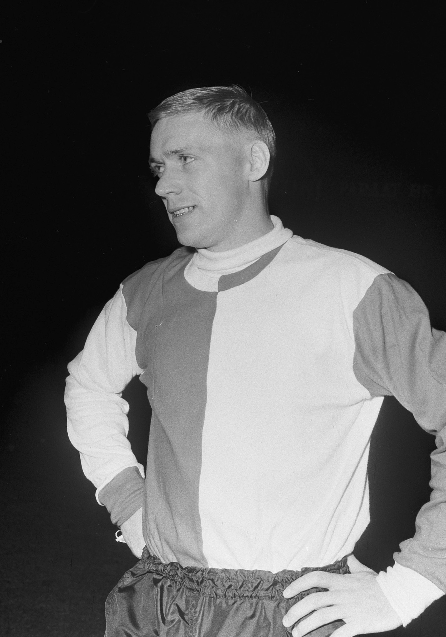 Voetbalwedstrijd Feyenoord tegen Noorse combinatie te Rotterdam: 5-1. Zweedse Feyenoord-speler Harry Bild